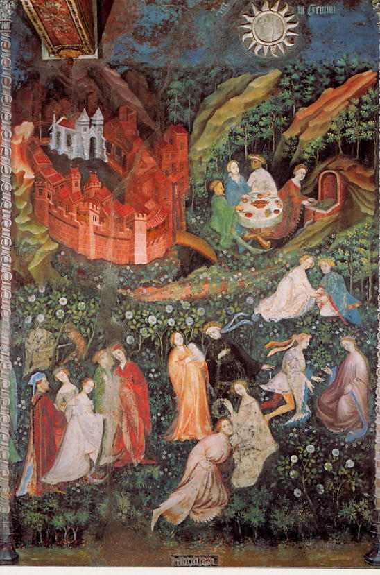 Ciclo dei mesi, maggio